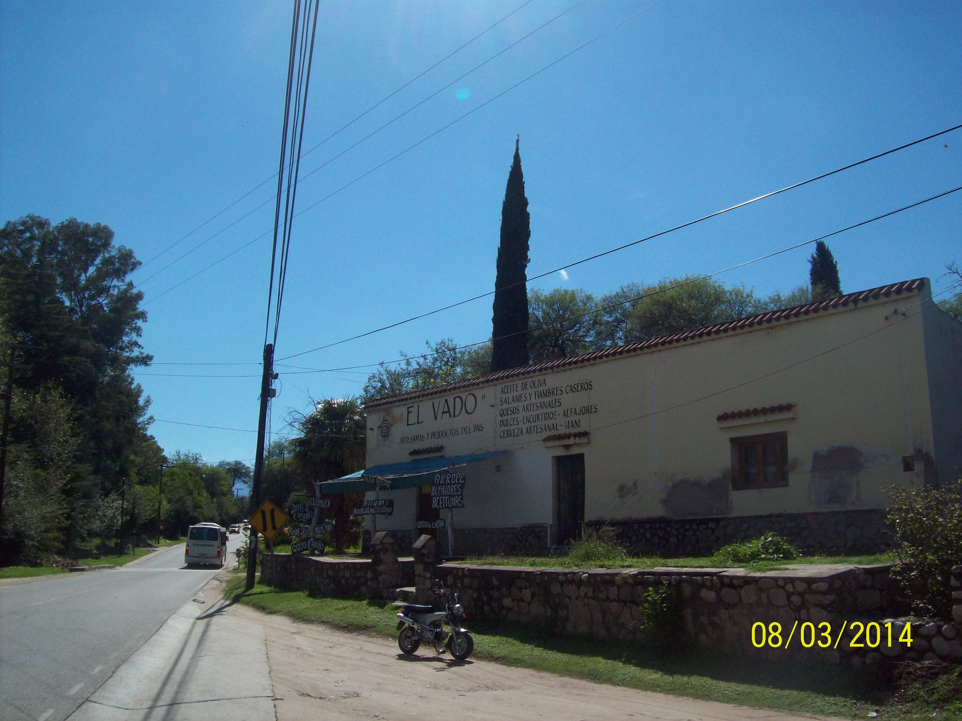 Villa de las Rosas, Córdoba